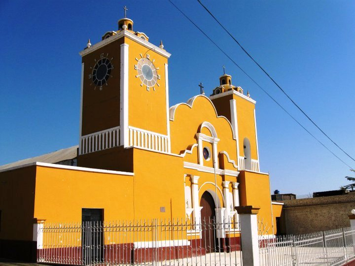 Parroquia San José — PACASMAYO — La Libertad region.